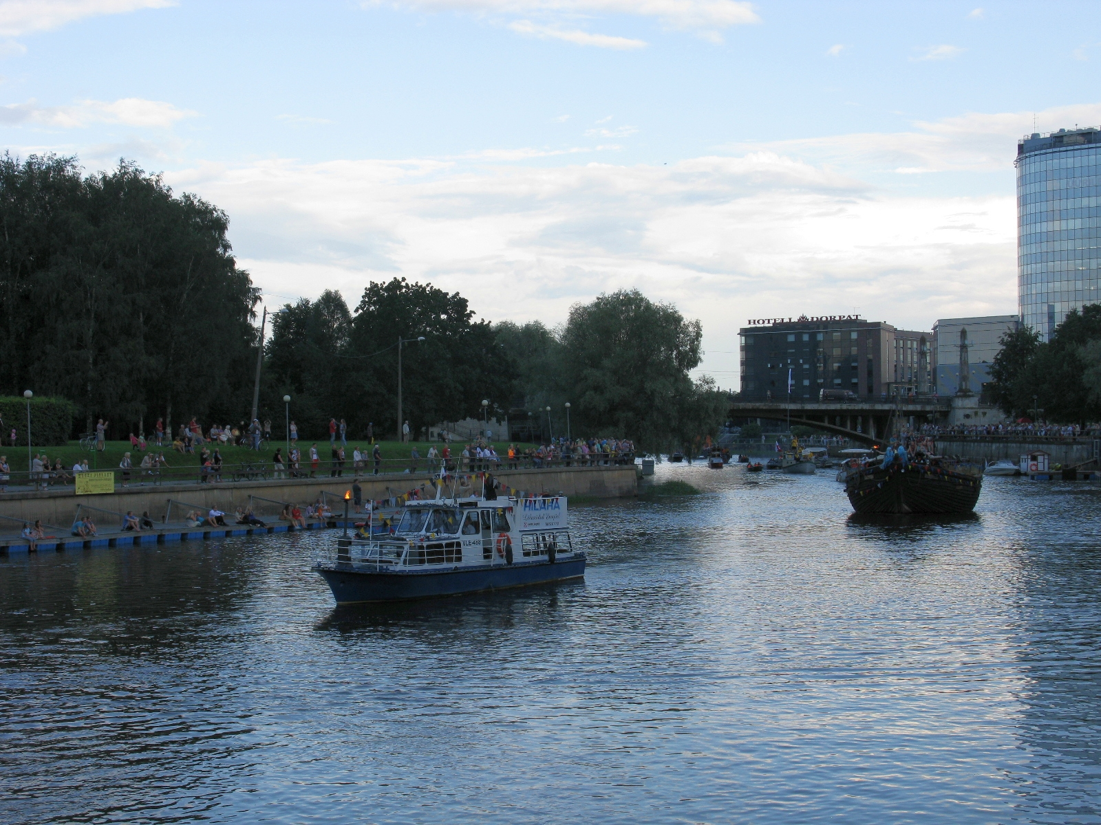 Jõelaev Hilara ja lodi Jõmmu Emajõe festivalil Tartus, taamal Võidu sild ja hotell Dorpat, 18. august 2012